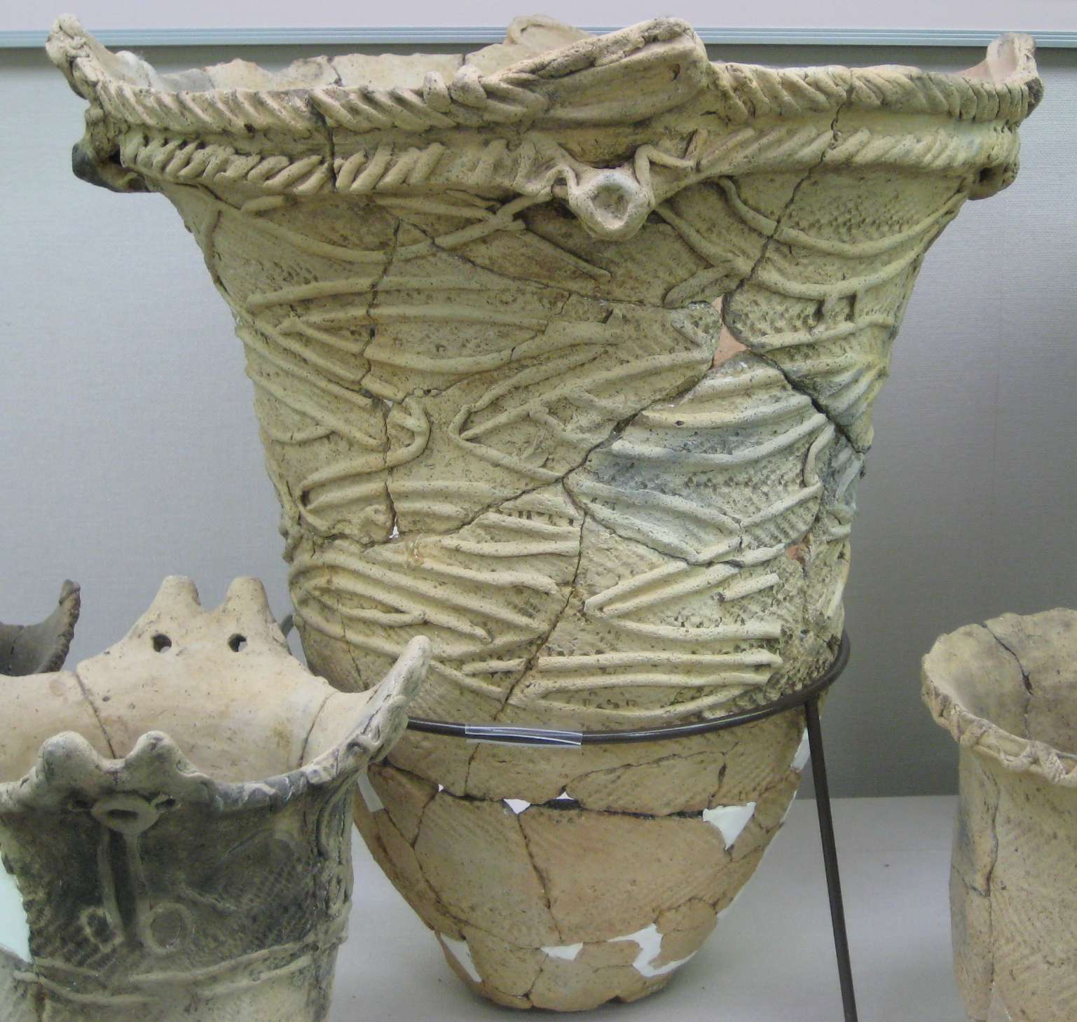 Un exemplaire de poterie retrouvée au site Sannai Maruyama